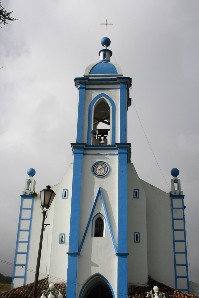 Iglesia de Santa María de la Natividad en Nauzontla, Puebla, México.